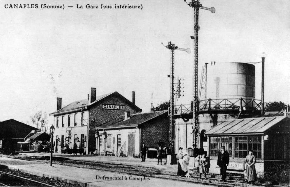 Intérieur de la gare de Canaples au début des années 1900.